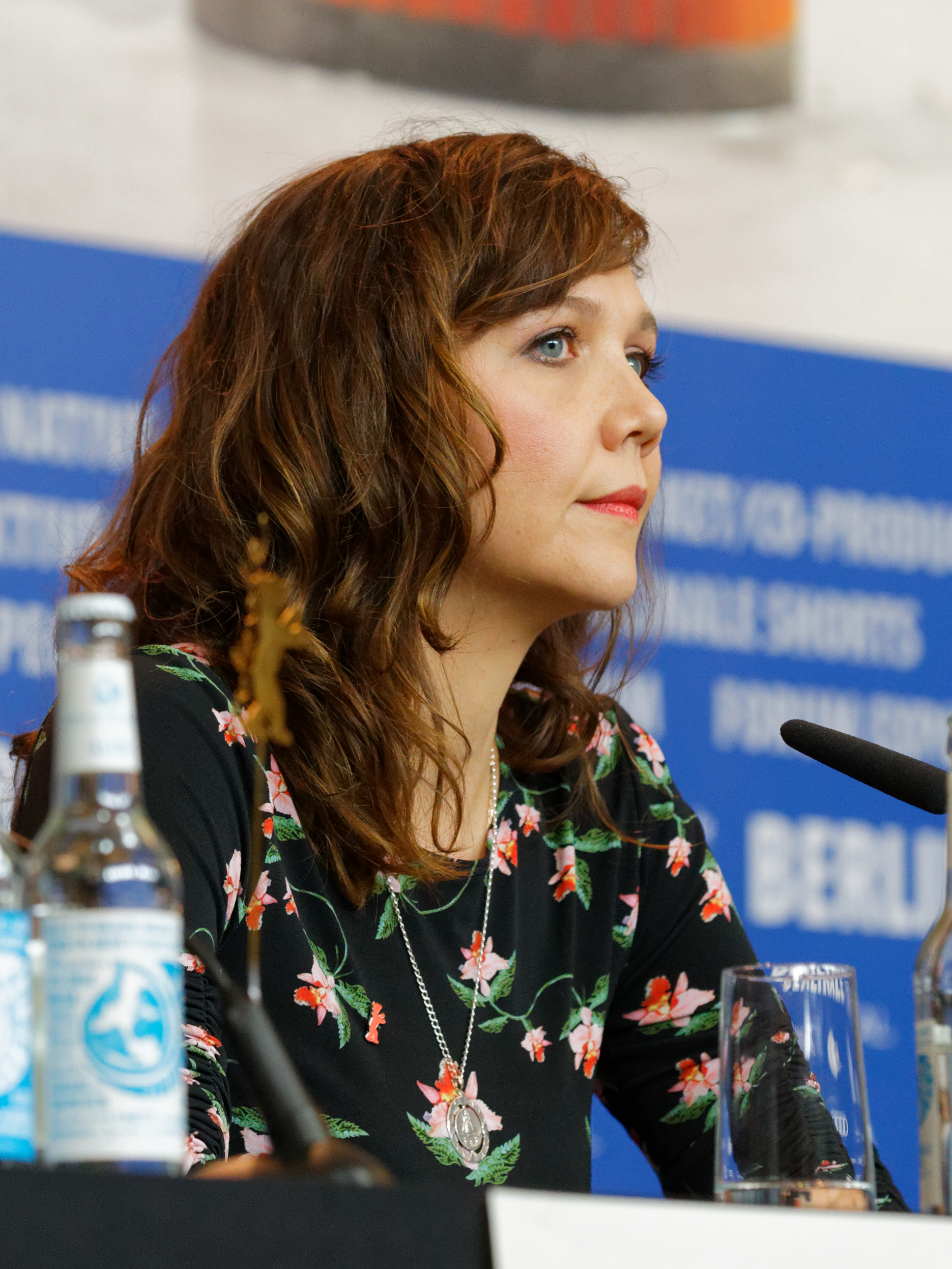 Maggie Gyllenhaal bei der Pressekonferenz der Internationalen Jury bei der Berlinale 2017